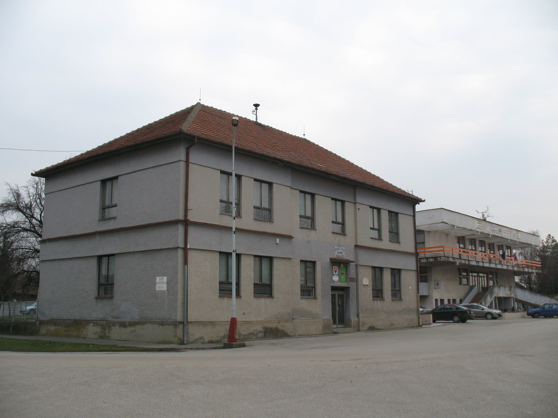 Nyitranagykér